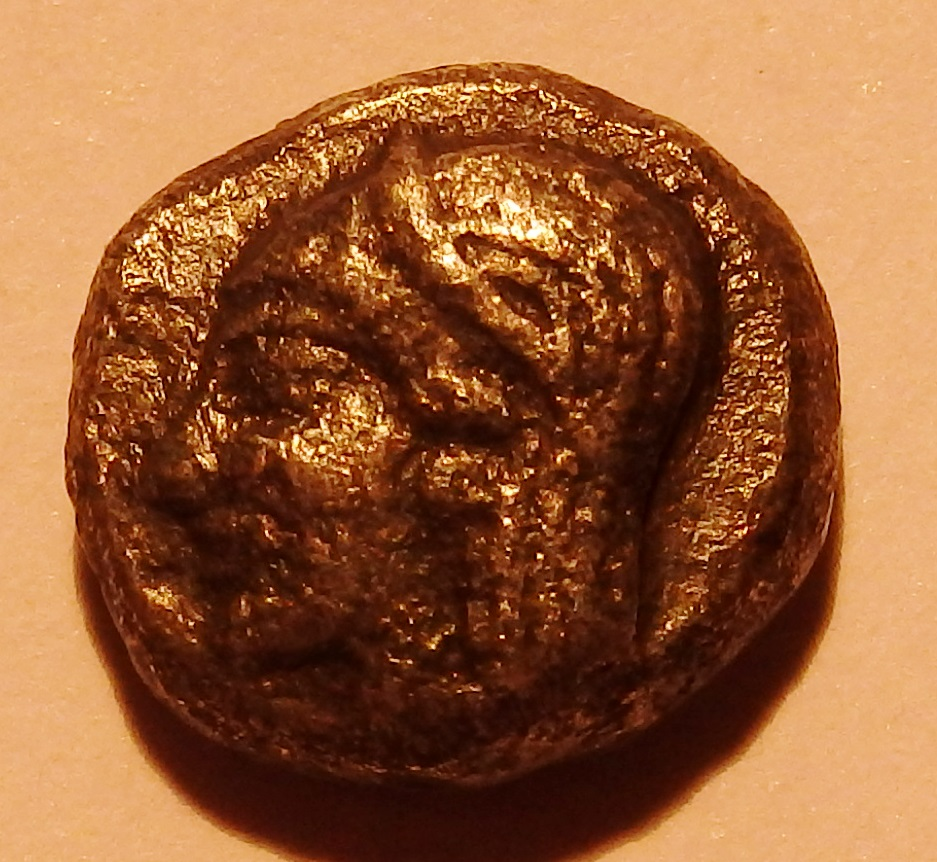 archaischer Kopf auf Diobol aus Kebren, 5. Jh. v. Chr.